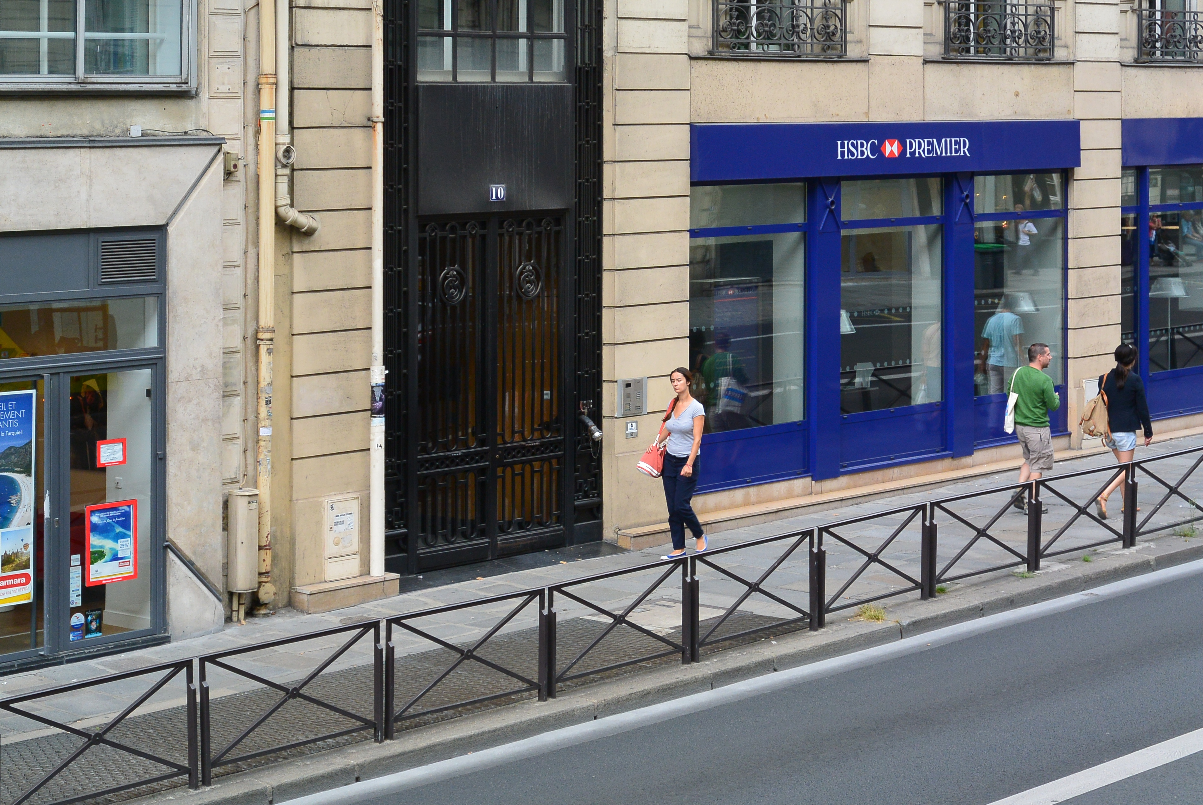 HSBC Premier, 10 rue Auber, Paris.